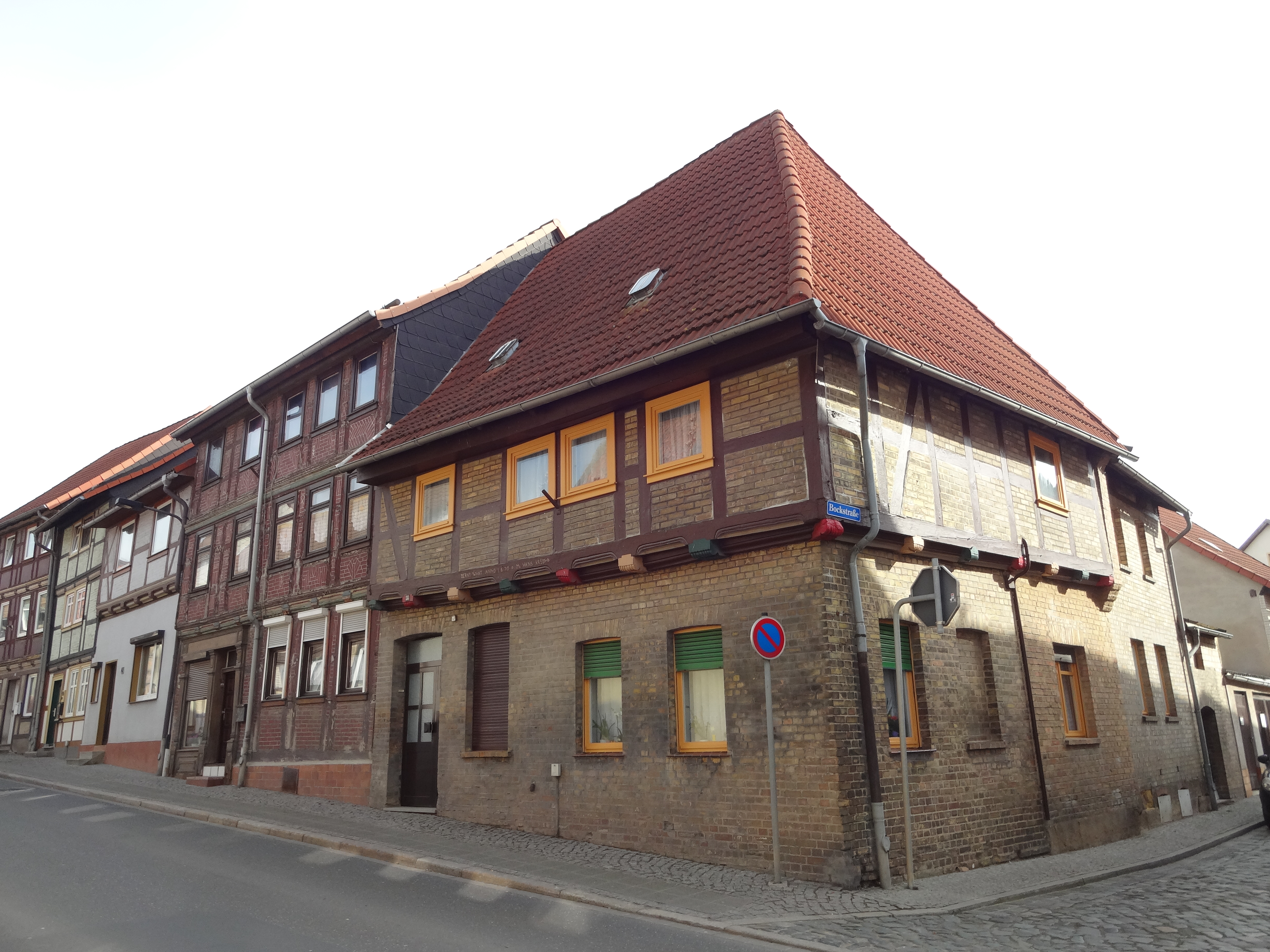 denkmalgeschütztes Fachwerkhaus in der Halberstädter Straße 38 in Derenburg, Ortsteil von Blankenburg (Harz) This is a picture of the Baudenkmal (cultural heritage monument) according to the Cultural Heritage Protection Law of Saxony-Anhalt with the ID 094 25227